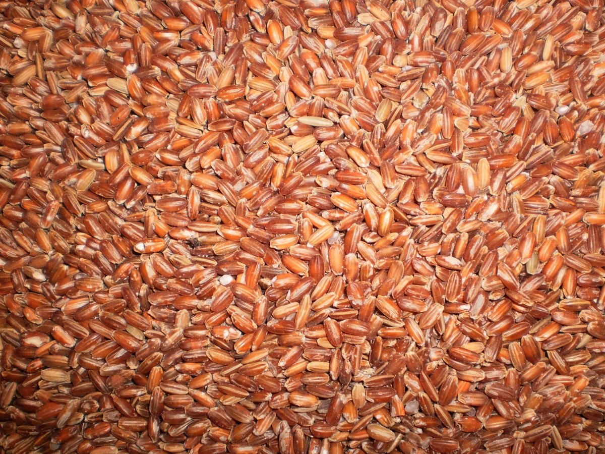 തവിട് കളയാത്ത അരി തവിട് കളയാത്ത അരി